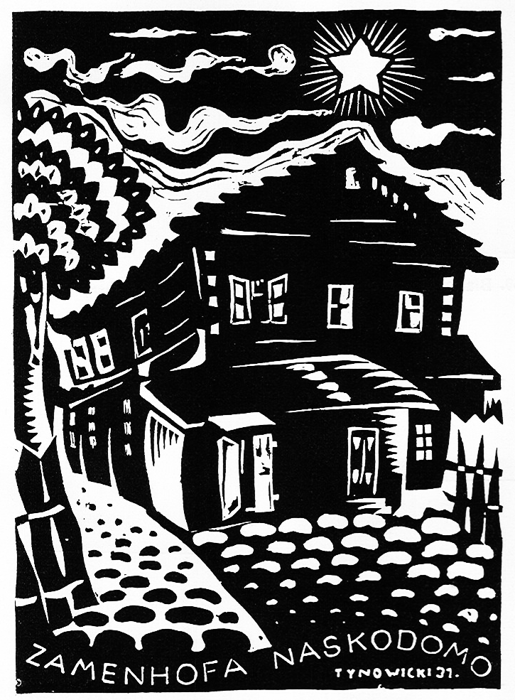 Grafika przedstawiająca dom urodzin Ludwika Zamenhofa, inicjatora języka esperanto.